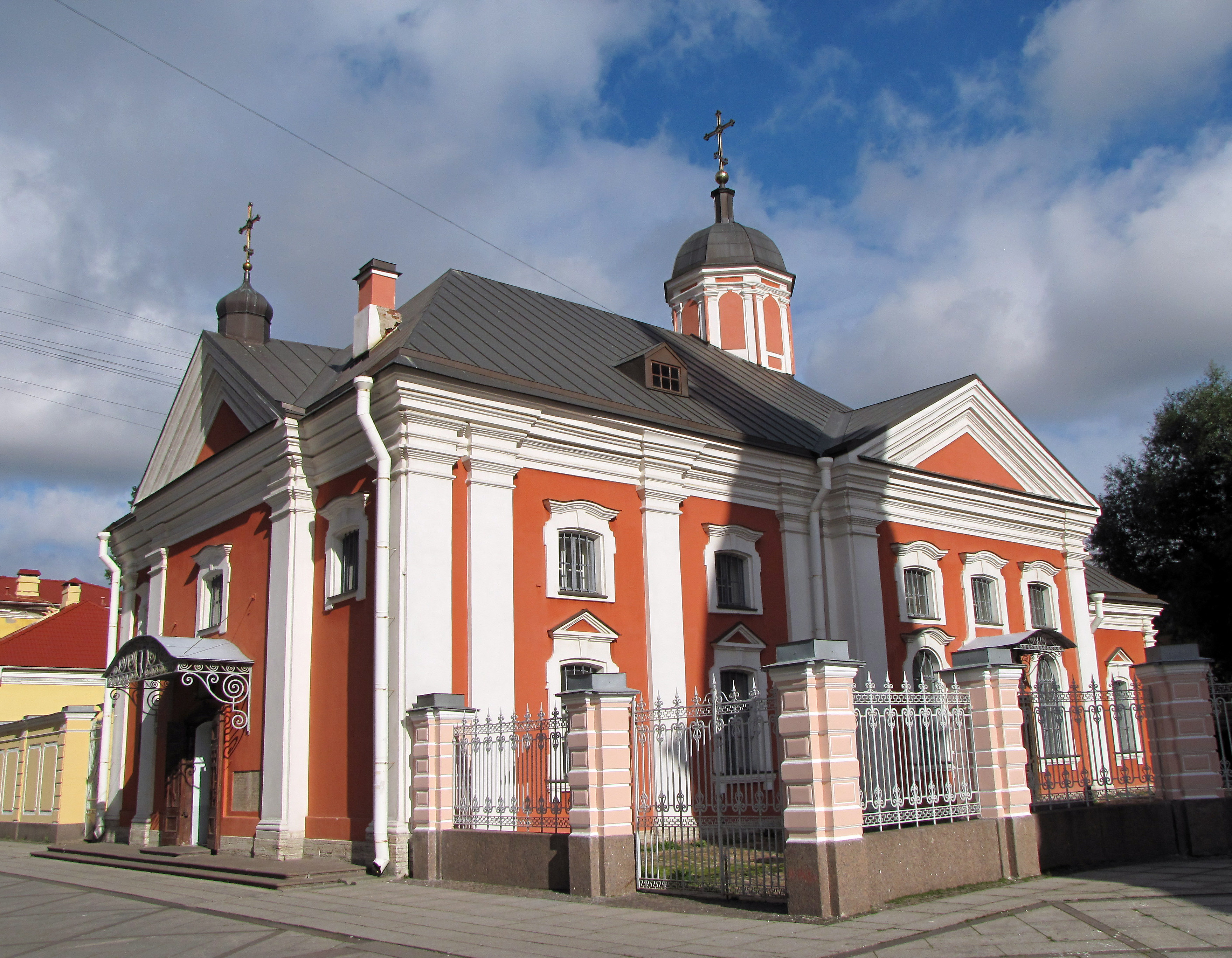 В 1740 году прихожане соборной Андреевской церкви, в то время ещё деревянной и не отапливаемой, обстоятельно описав неудобства проведения богослужений в холодное время года, обратились к императрице Анне Иоанновне с просьбой о разрешении построить рядом с церковью, на её участке, тёплый каменный храм. Последовал Высочайший указ по которому 2 июля 1740 года и был заложен храм во имя Трёх Святителей Вселенских Василия Великого, Григория Богослова и Иоанна Златоуста. Начавшееся по проекту Карло-Джузеппе Трезини строительство из-за недостаточности средств затянулось… В 1743 году по челобитью священника Андреевской церкви Иакова Тихонова императрица Елизавета Петровна издала указ Сенату о том, что бы денег за материалы на строительство нового храма с прихода не требовать, т.к. при Андреевской церкви не имелось вкладных сумм. В 1745 году церковь была построена, и в ней начались богослужения. Освящена Трёхсвятительская церковь с Благовещенским приделом на хорах лишь 17 сентября 1760 года.